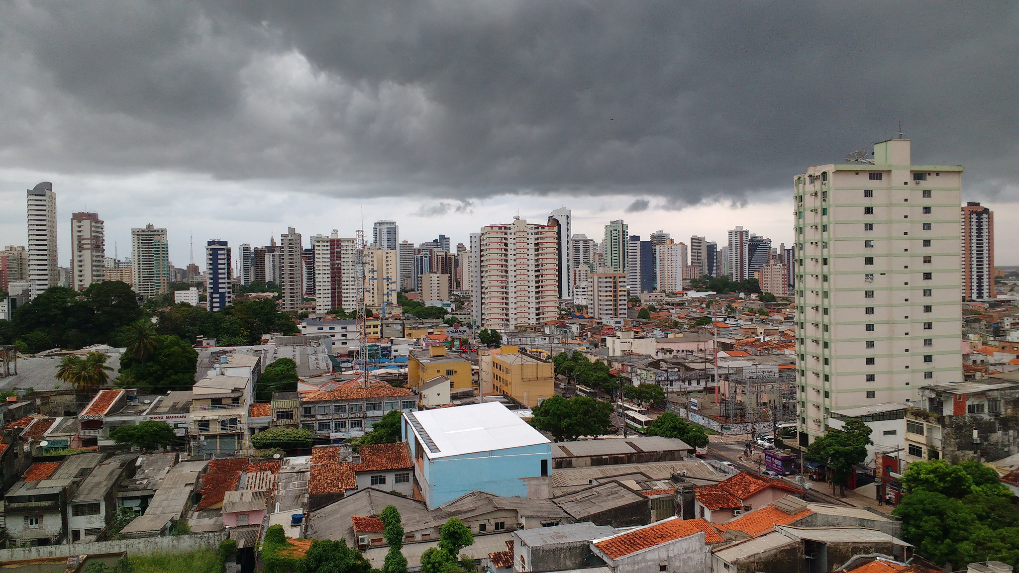 Belém, capital do estado do Pará, Brasil.